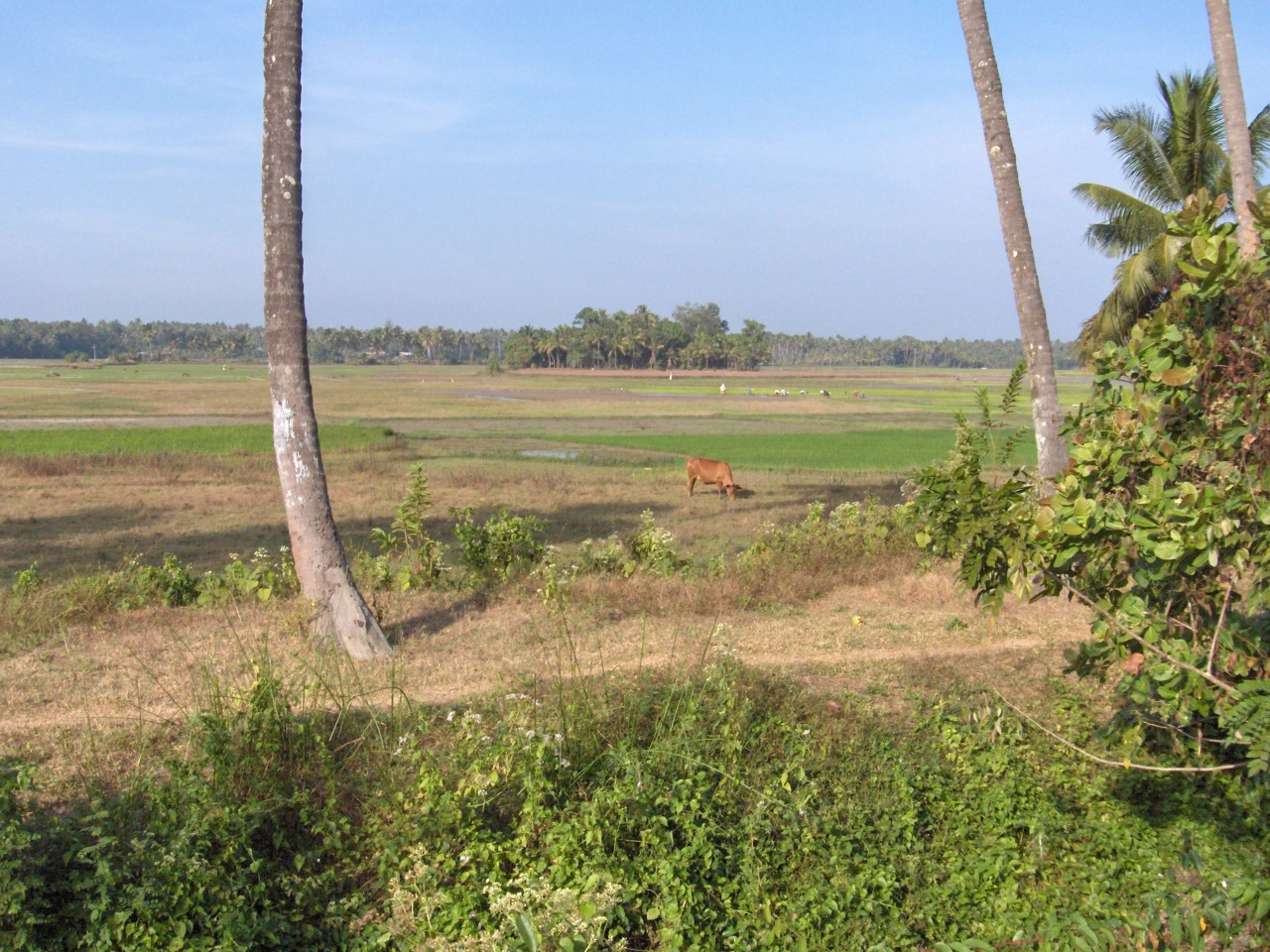 Chamakunnu - Thotuvarambu